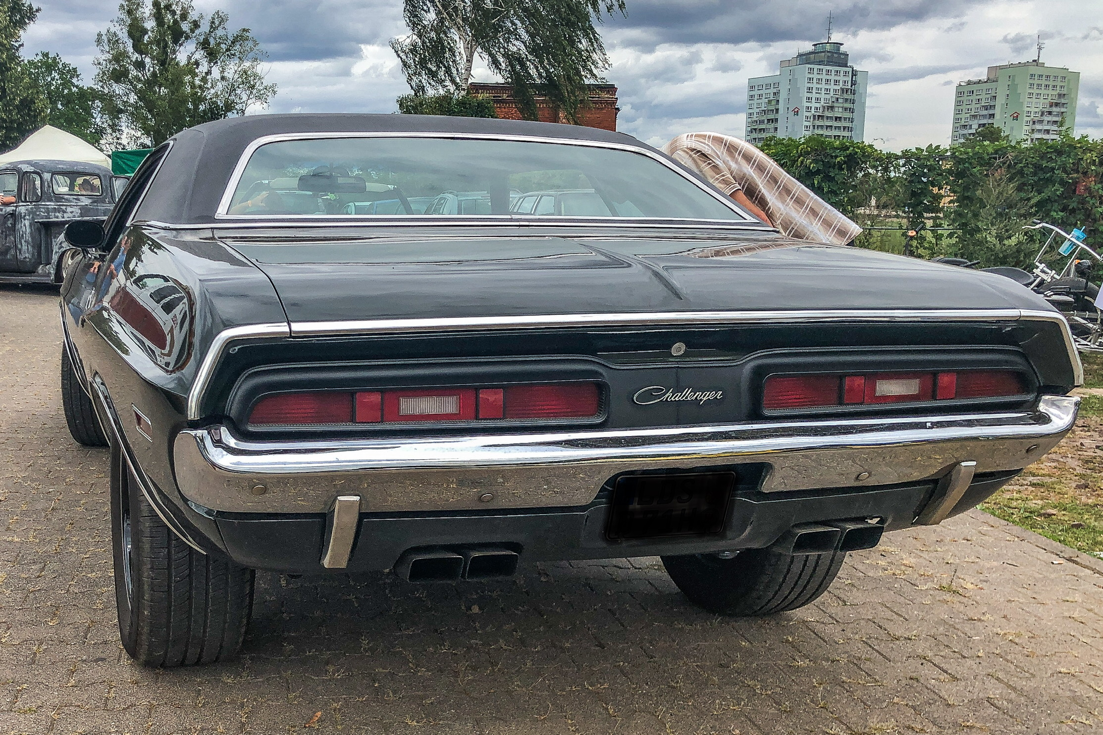 1970/71 Dodge Challenger (Heck)